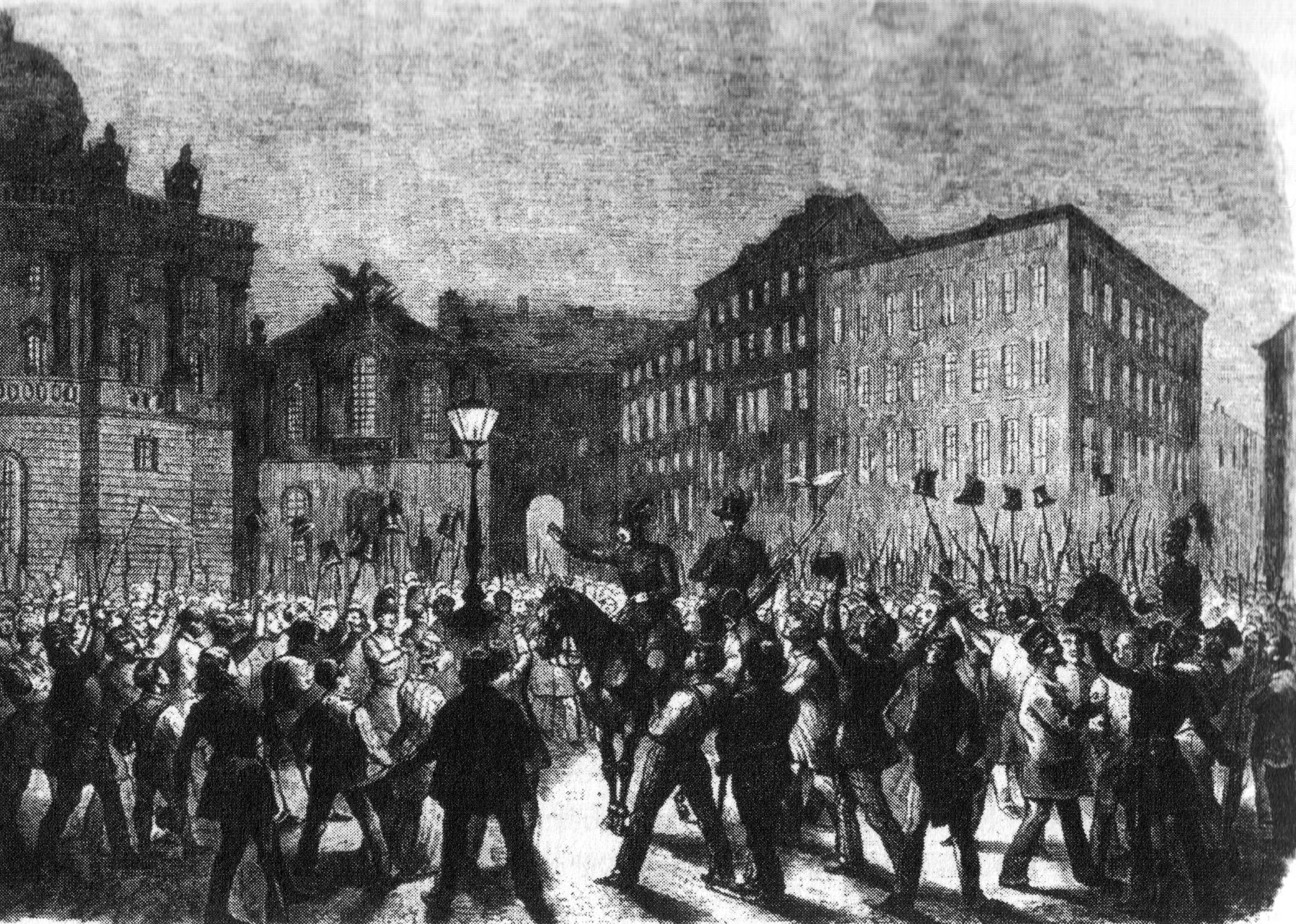 Illustrirte Zeitung, Leipzig, Nr. 257, 3. Juni 1848, 363. Verkündung neuer Zugeständnisse auf dem Verfassungsplatz in Wien, 15. Mai.